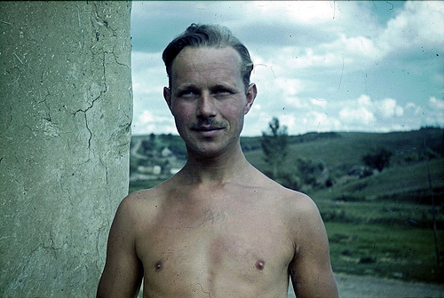 Franz Grasser Selbstbildnis zwischen 1942 und 1943